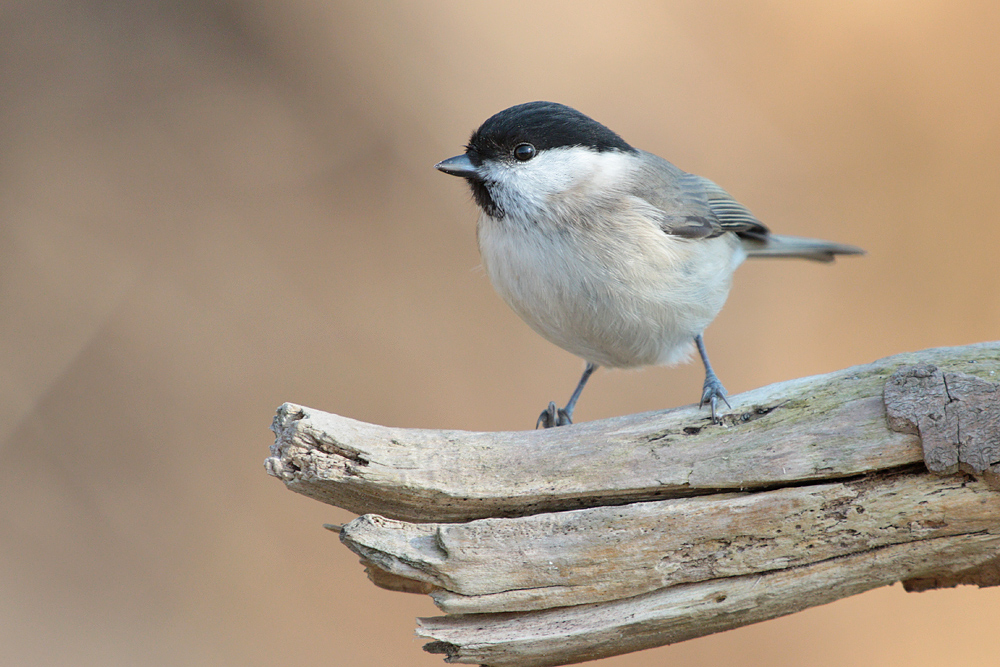 Sumpfmeise in der Nähe des Ilkerbruchs